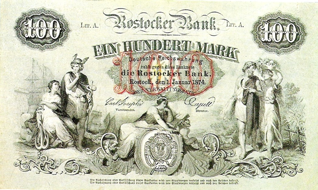 Banknote der Rostocker Bank über 100 Mark von 1874